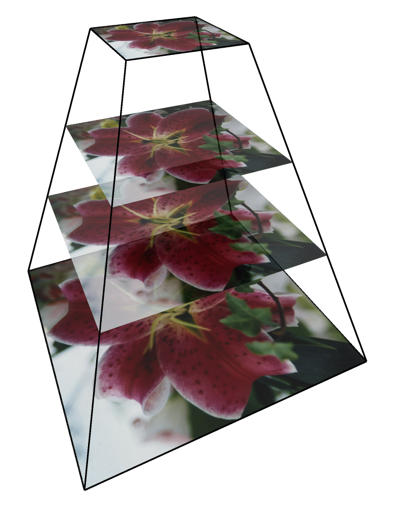 Exemple d'une pyramide d'image. Propriétaire: moi même, l'image est générée à partir de ma propre application.